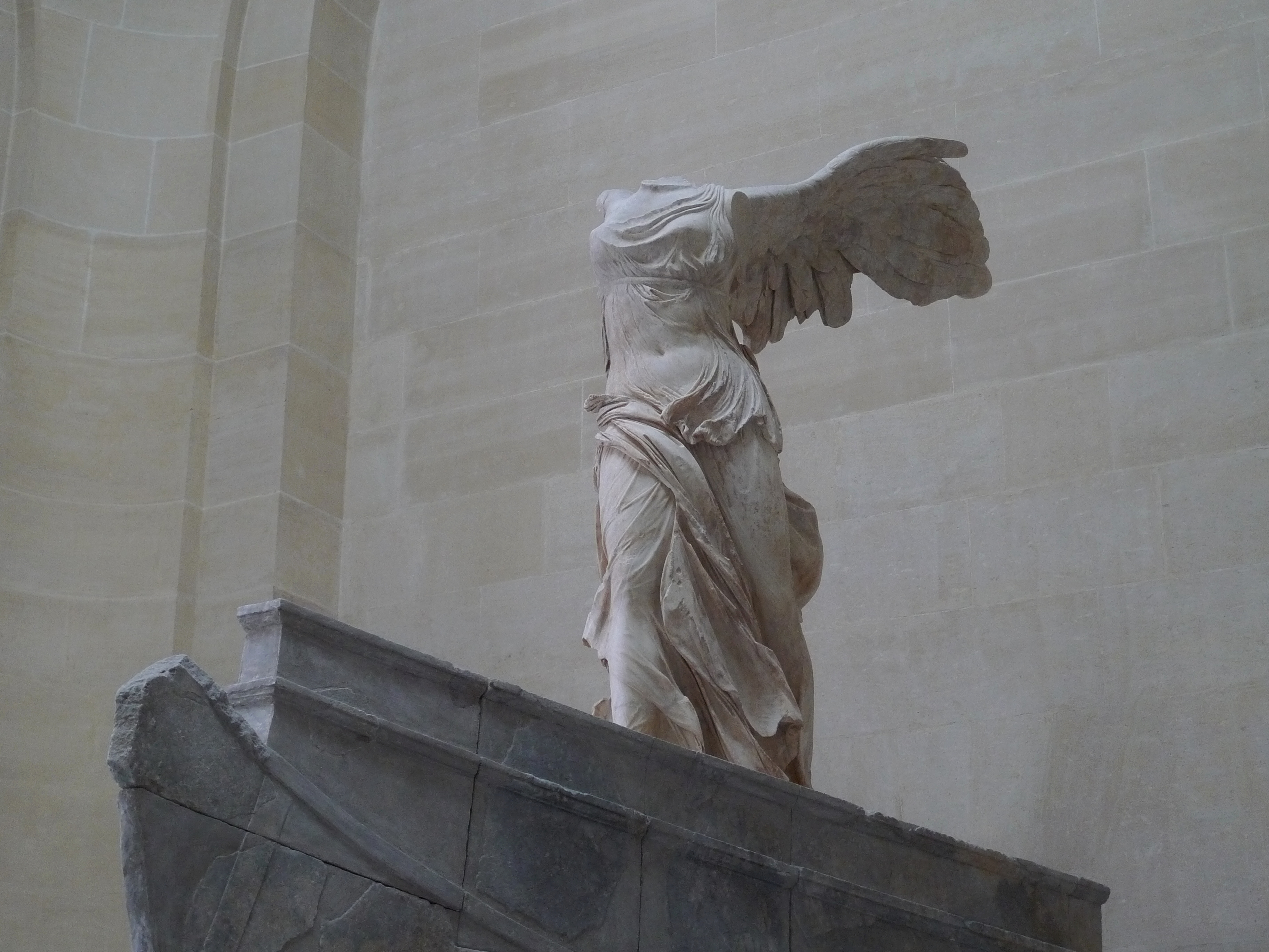 Palais du Louvre